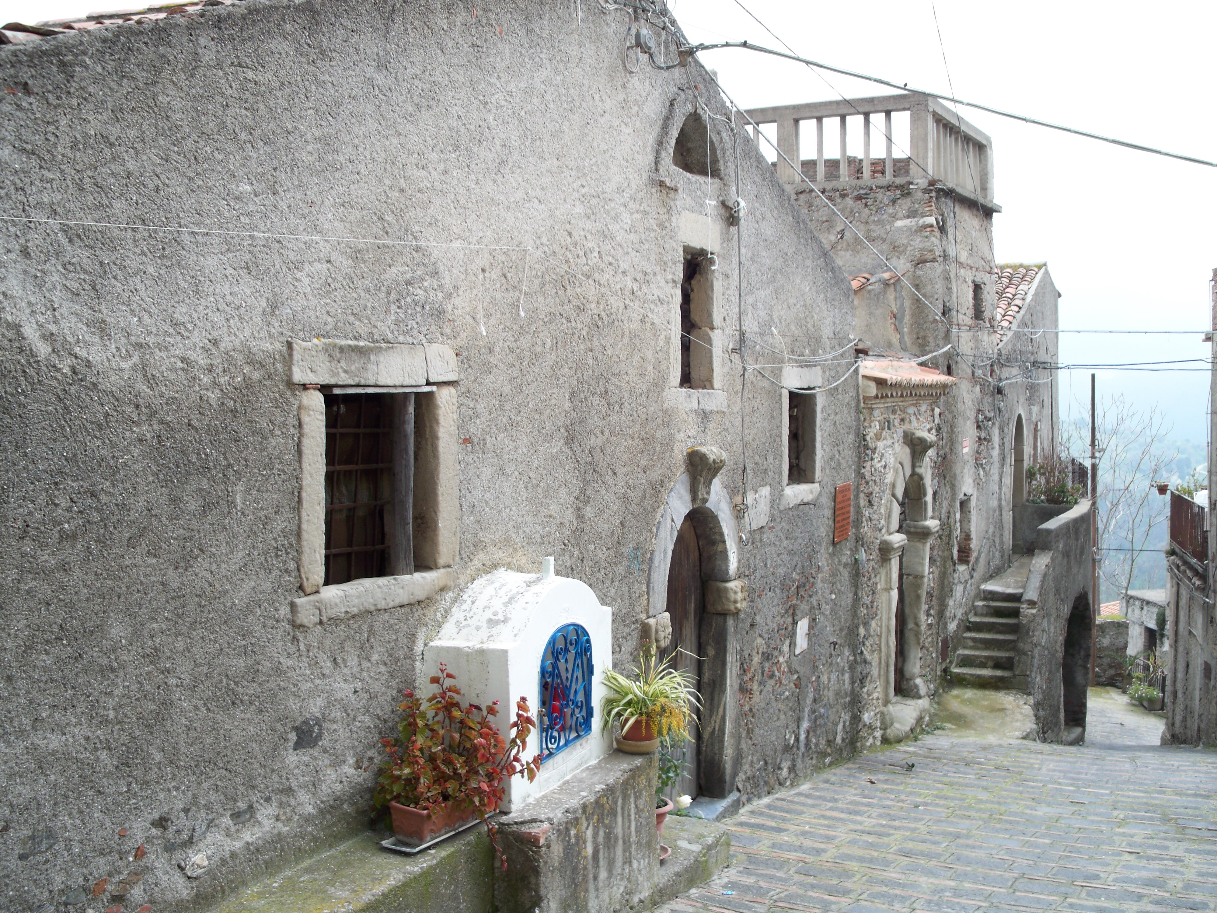 Scorcio della Piazza Vecchia Casalvecchio Siculo